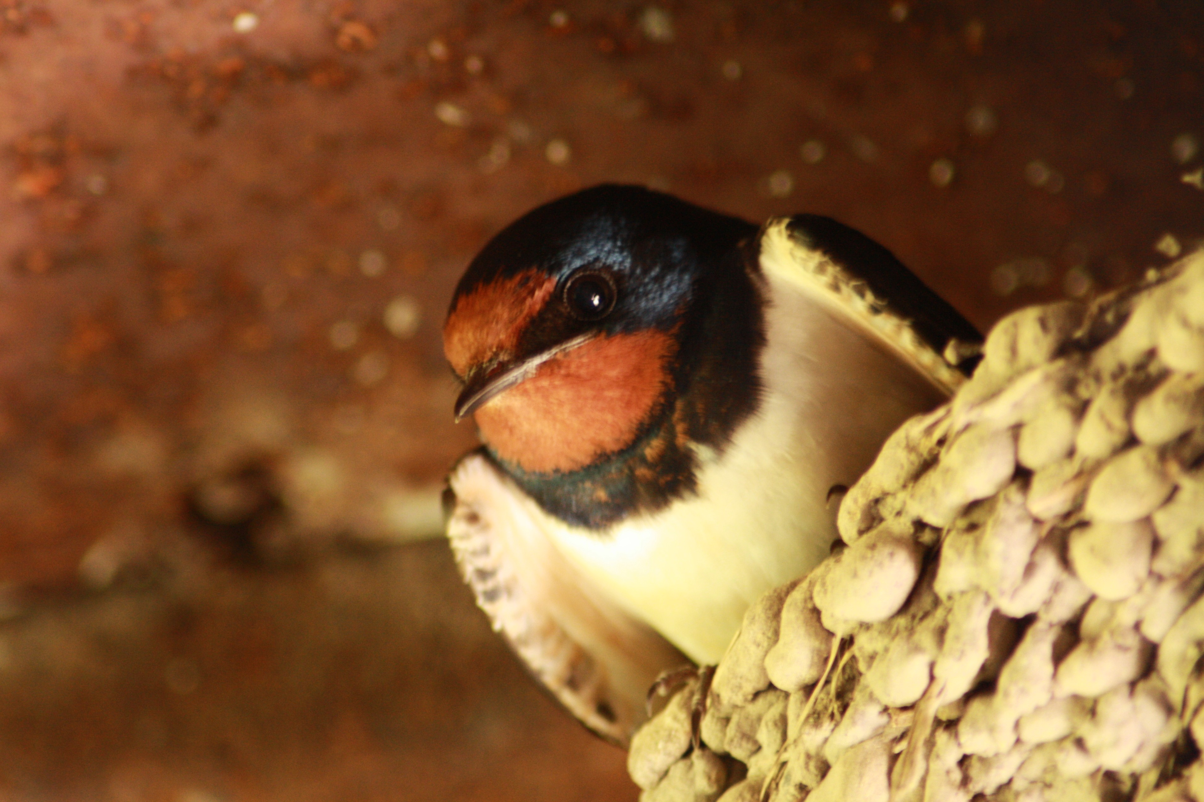 Suitsupääsuke pesal. Pildistatud Eestis.